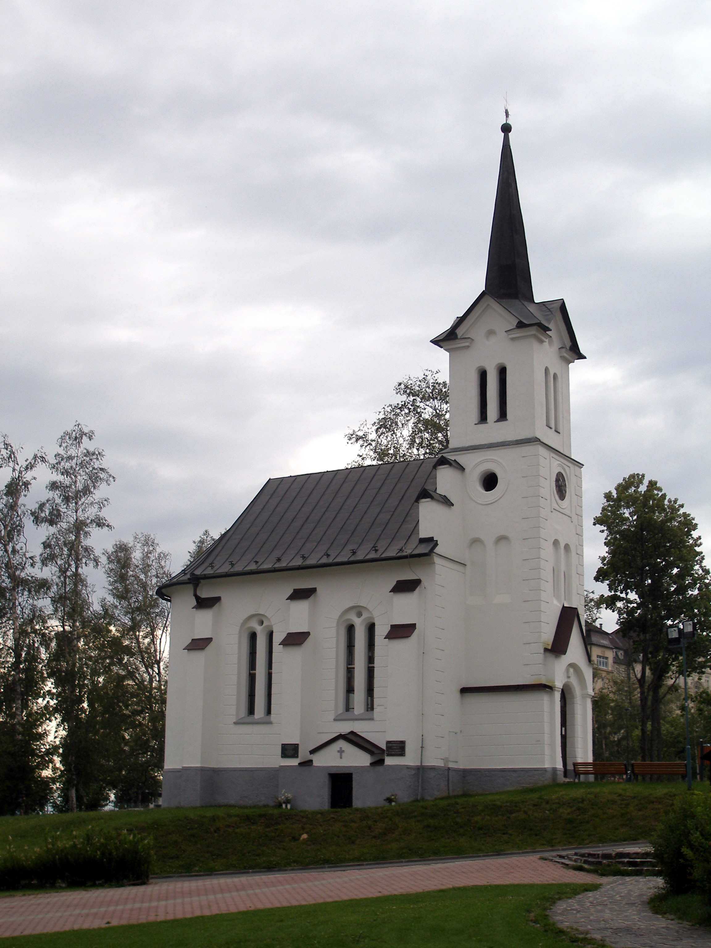 Neogotický evanjelický kostol z roku 1887. Osada Nový Smokovec mesto Vysoké Tatry.